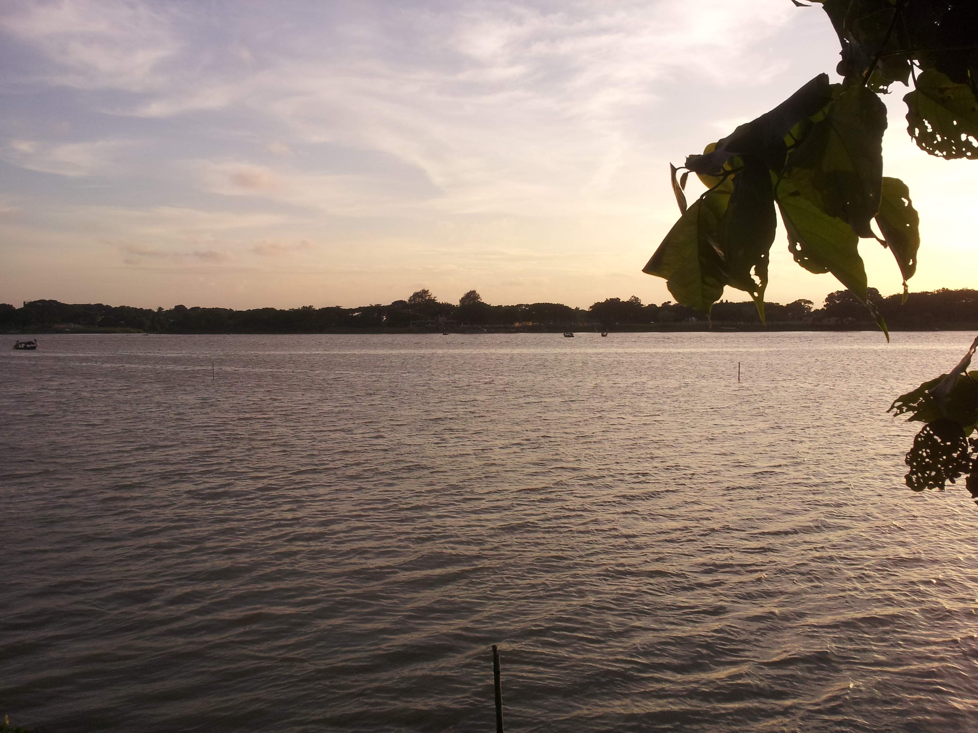 ঢাকার অদূরে সাভার মডেল থানা কার্যালয়ের পাশে বংশী নদীর দৃশ্য